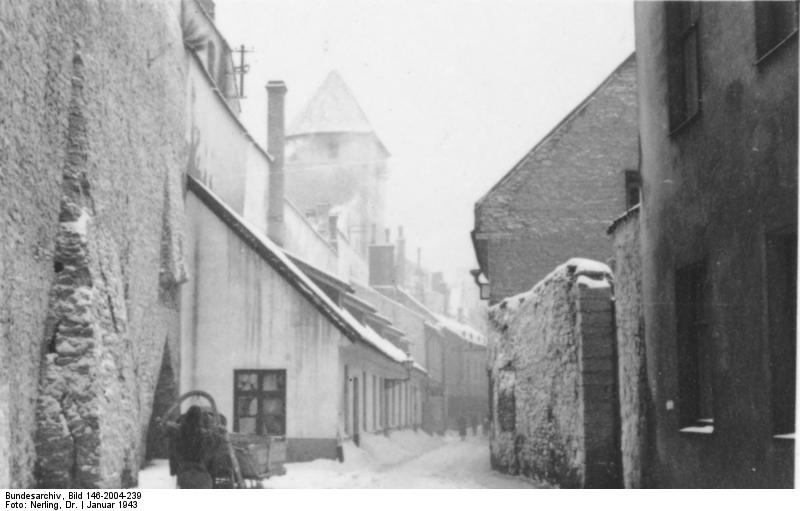 Reval [Tallin], 17.-18.1.1943 Häuser in der Mauerstrasse Einsatzstab Reichsleiter Rosenberg für die besetzten Gebiete - Hauptarbeitsgruppe Ostland Film: 58/23